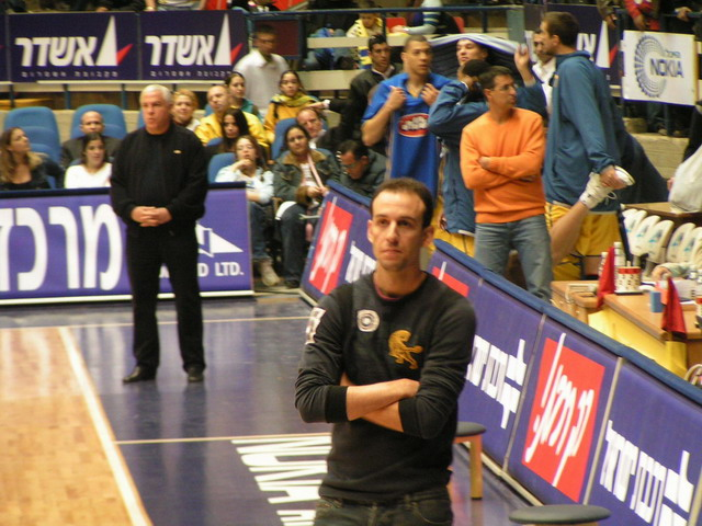 עודד קטש, שחקן עבר של מכבי ת"א, היום מאמן, במשחק מול מכבי. צולם על-ידי אבי קדמי This picture was taken by Avi Kedmi